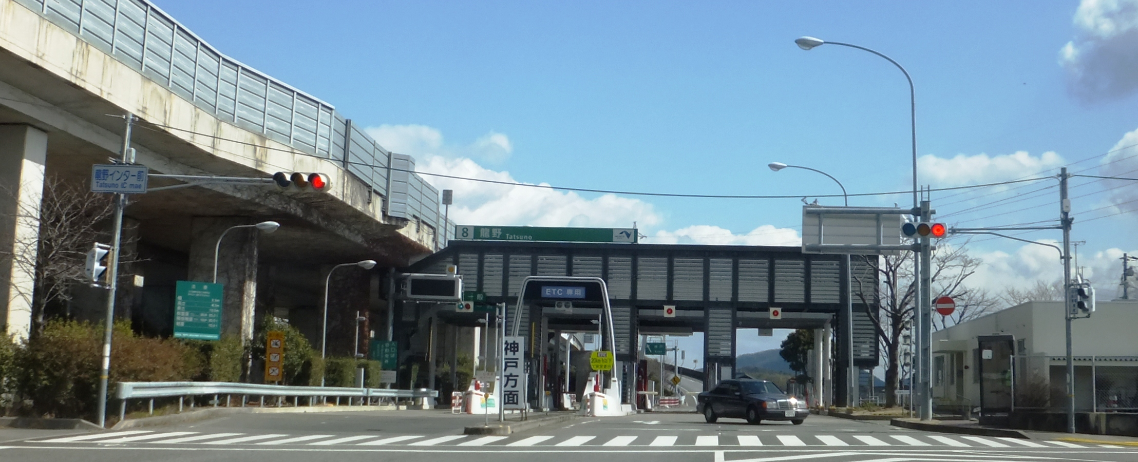 龍野インターチェンジ 2013年